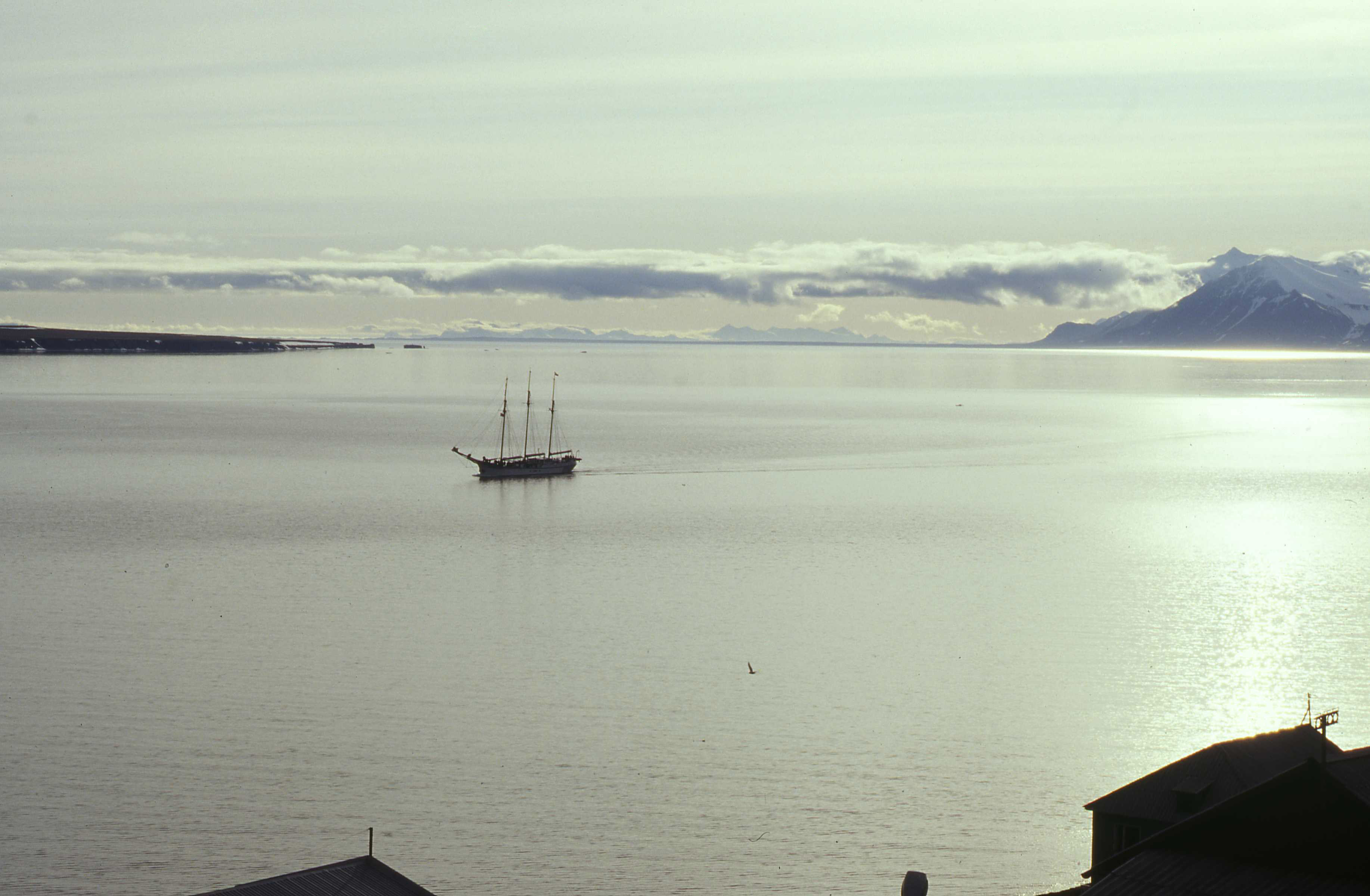 Binnenkomende Nederlands driemaster "Oosterschelde" die gaat aanleggen in Barentszburg. Zicht van Isfjorden en gletsers in de achtergrond.